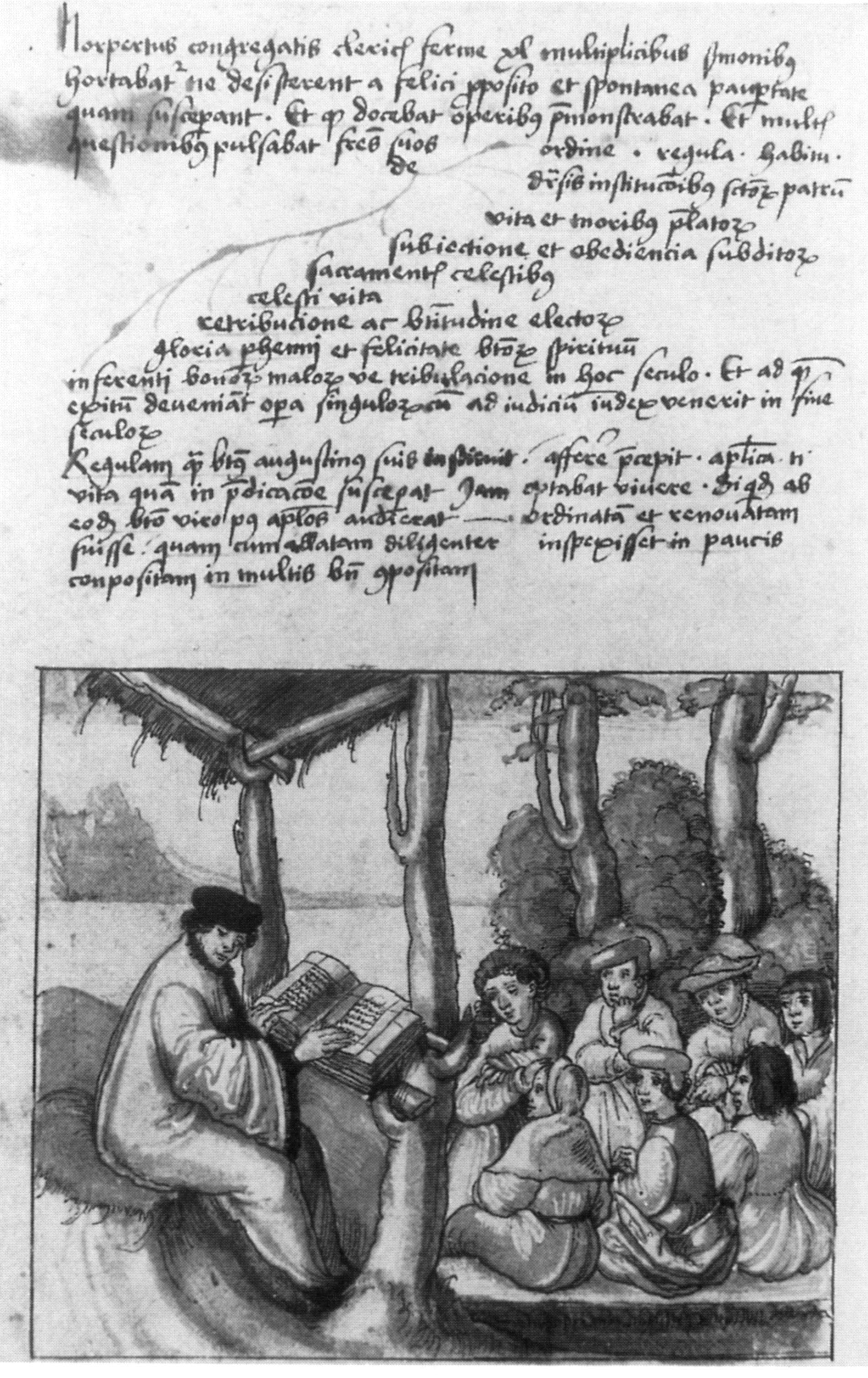 Norbert unterweist seine Gefährten; aus dem Norbert-Zyklus im so genannten Traditionskodex aus Kloster Weißenau, heute Fürstlich Waldburg-Zeil'sches Gesamtarchiv, Schloss Zeil, ZA Ms 41; fol. 10